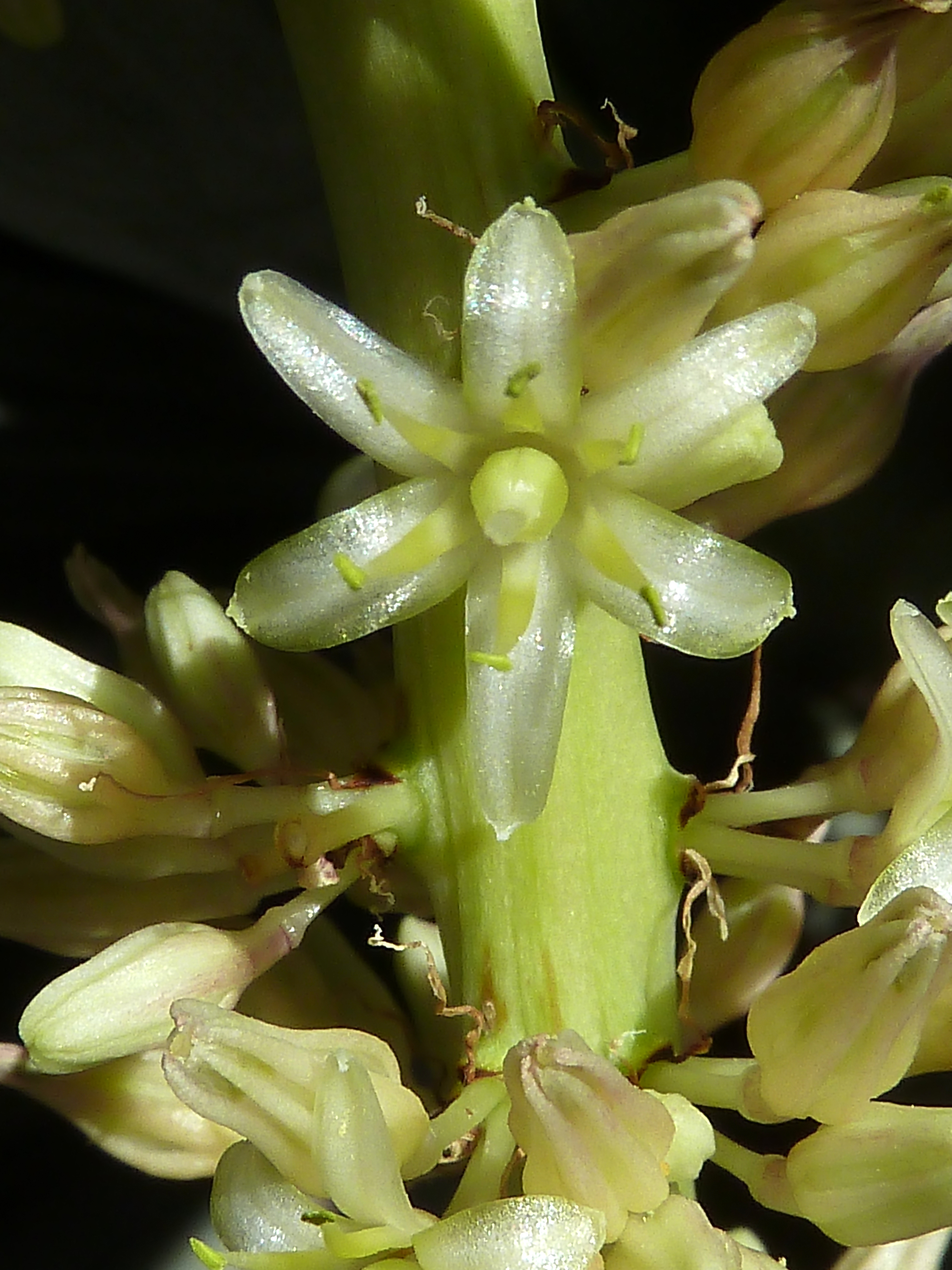 Dracaena draco (drago) - Flor en antesis, vista cenital - Cultivado/ornamental, Avda de La Libertad, Albatera (Provincia de Alicante, España).